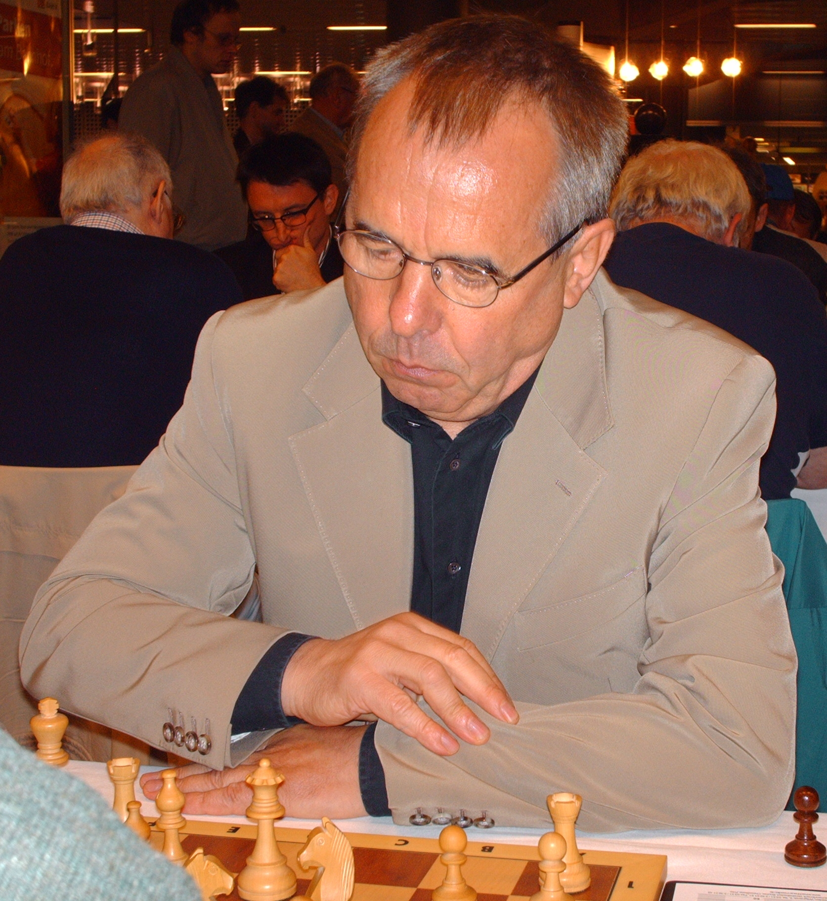 Paul Werner Wagner beim Schachfestival der Emanuel Lasker Gesellschaft im Berliner Hauptbahnhof